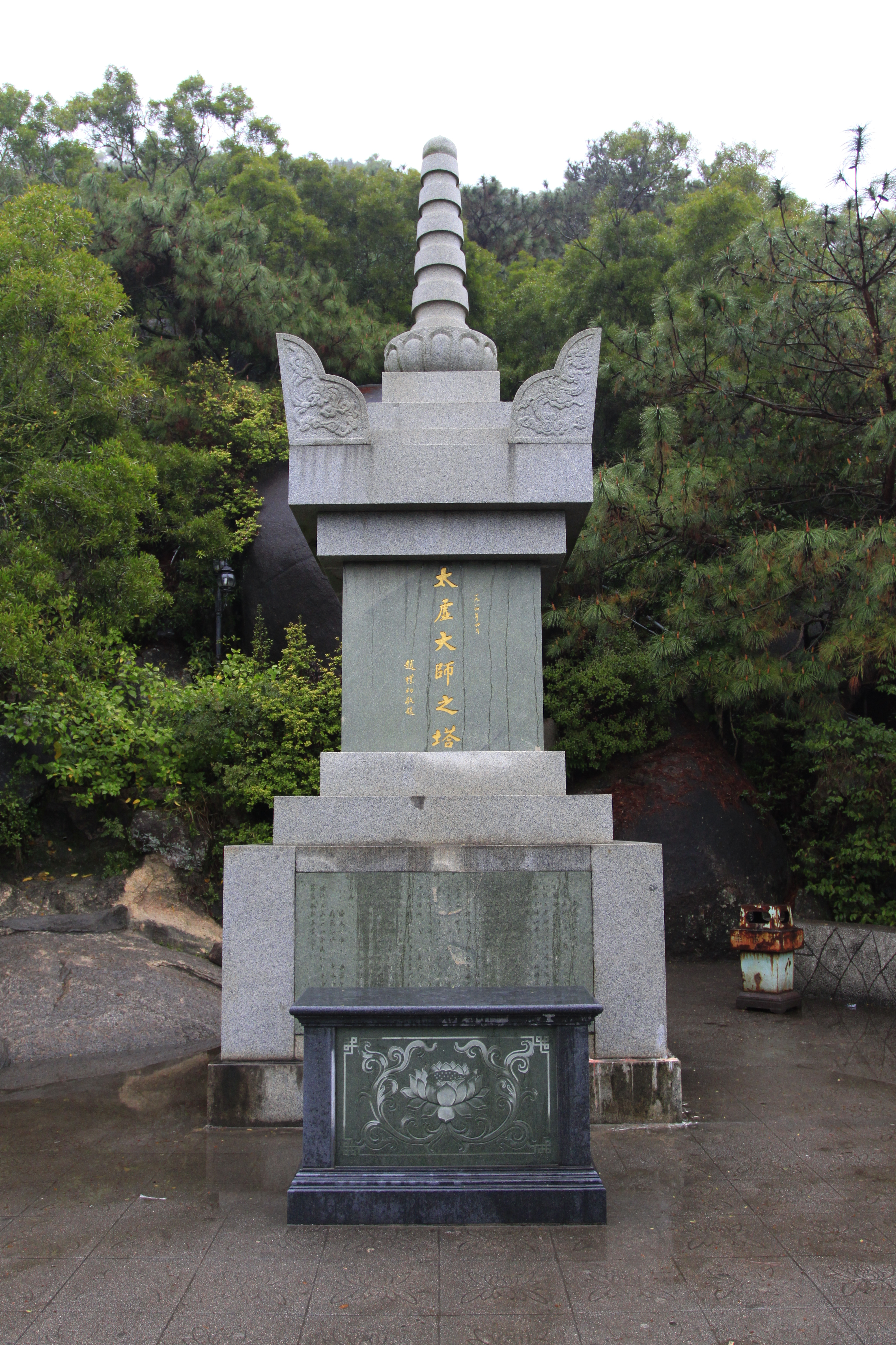 南普陀寺太虚大师舍利塔，位于中国福建省厦门市。